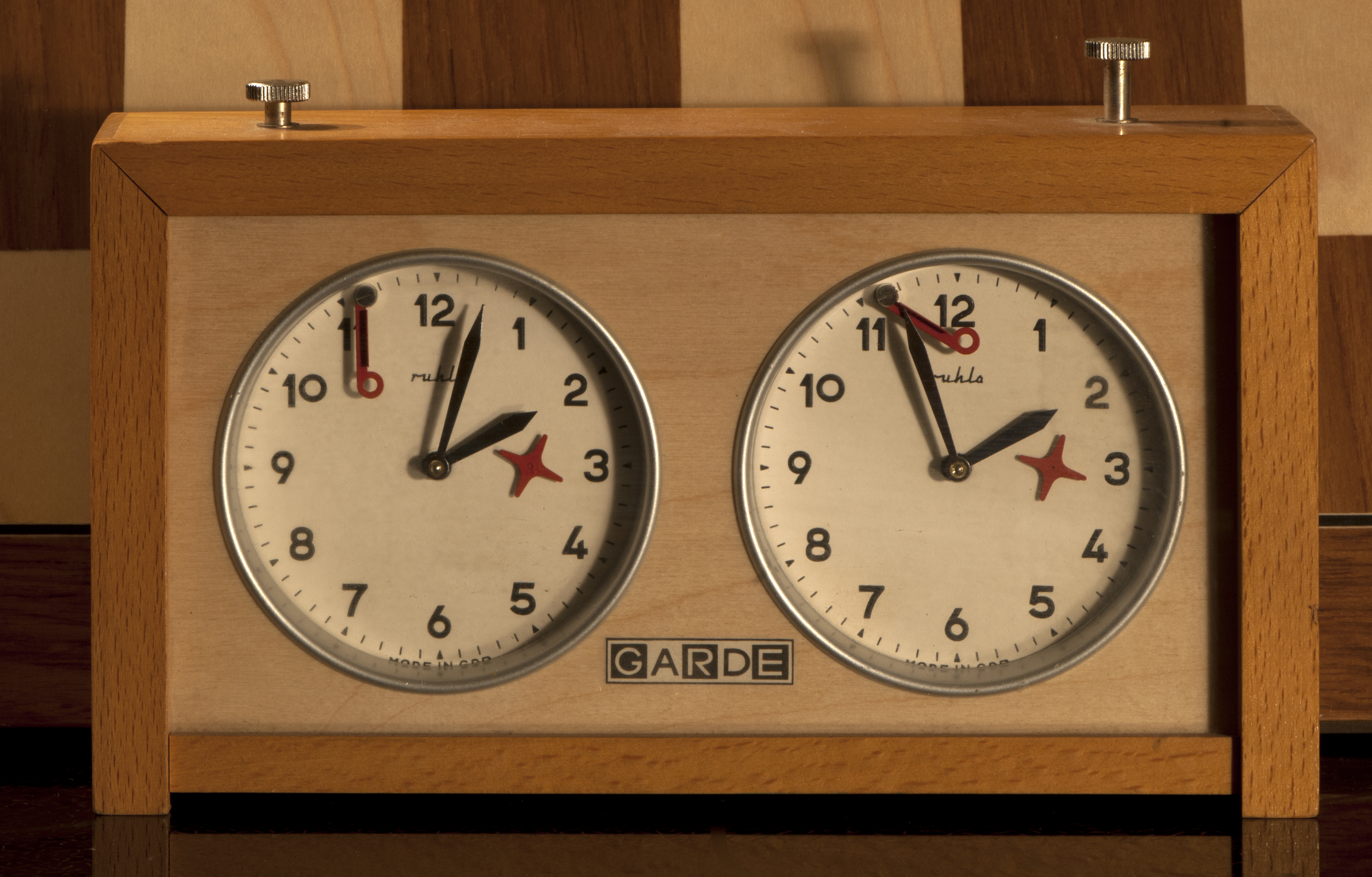 "GARDE"-Schachuhr, mechanisch Funktion der einzelnen Teile: oben 2 über eine Wippe gekoppelte Schalter, über die immer nur eine Uhr eingeschaltet werden kann die Zahlen geben Stunden an, nicht die korrekte Uhrzeit der Minutenzeiger hebt das über der 11 angebrachte Blättchen, auch Fähnchen oder Plättchen an; der Fall des Blättchens zeigt das Überschreiten der Bedenkzeit an, bei der GARDE-Uhr auch durch ein Geräusch der rote Stern neben der 3 zeigt durch Drehung, dass die Uhr geht, da kein Sekundenzeiger vorhanden ist